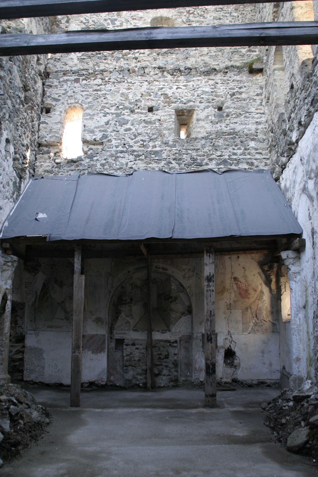 Burg Heinfels, Heinfels Castle - Laurentiuskapelle, 1331, Zustand 2010. This media shows the remarkable cultural object in the Austrian state of Tyrol listed by the Tyrolean Art Cadastre with the ID 17484. (on tirisMaps, pdf, more images on Commons, Wikidata)